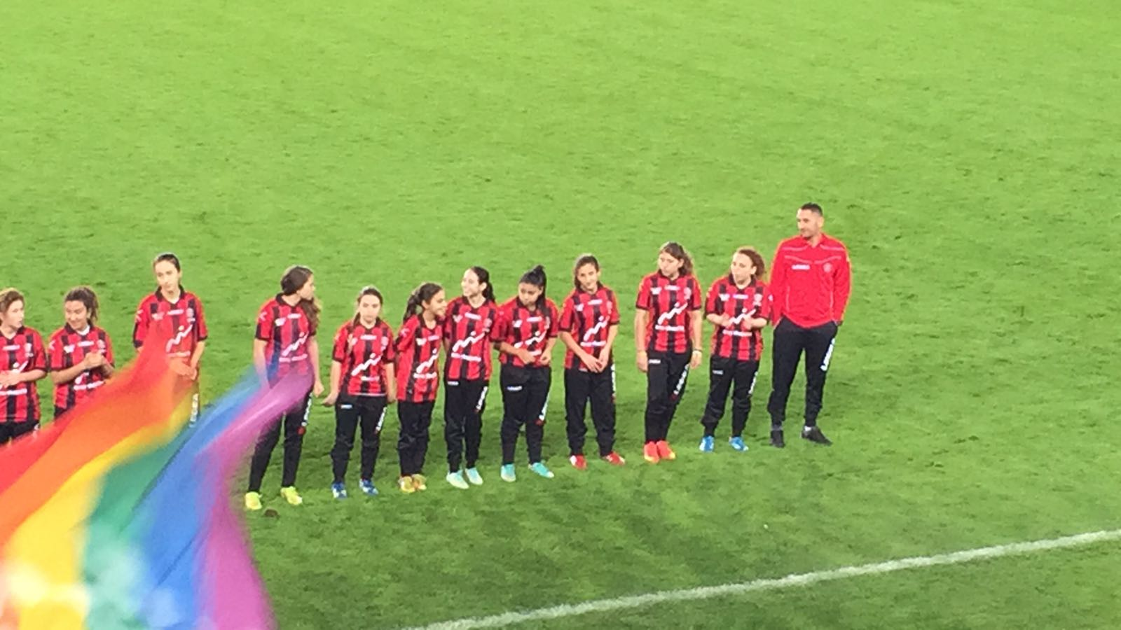 טקס שינוי שם הקבוצה בטדי.